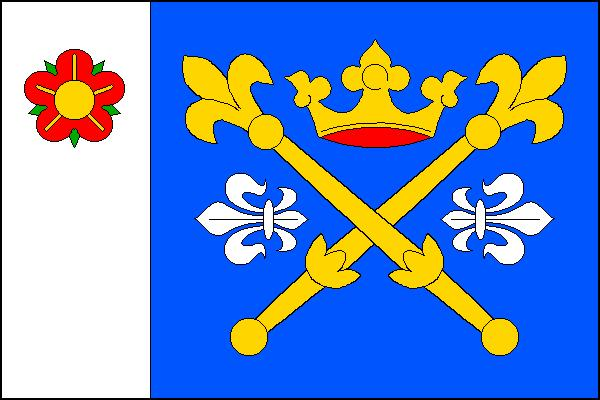 Česky: vlajka obce Řípec